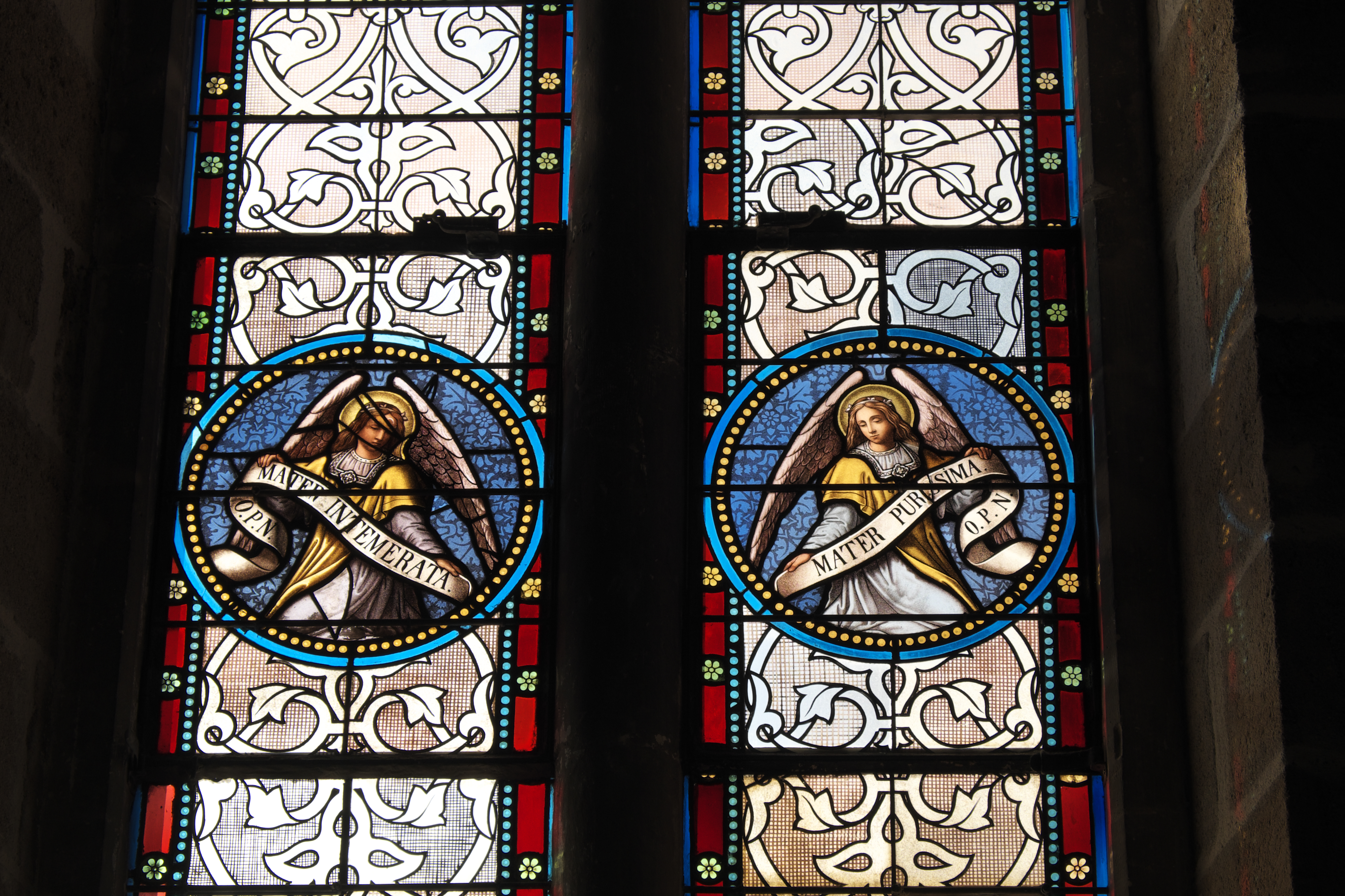 Ehemalige Kapelle Notre-Dame, heute Veranstaltungssaal des Hôtel de Paris, 21 rue de Paris, in Moulins im Département Allier (Auvergne-Rhône-Alpes/Frankreich), Bleiglasfenster von Louis-Victor Gesta, von 1875; Darstellung: Engel mit Spruchbändern